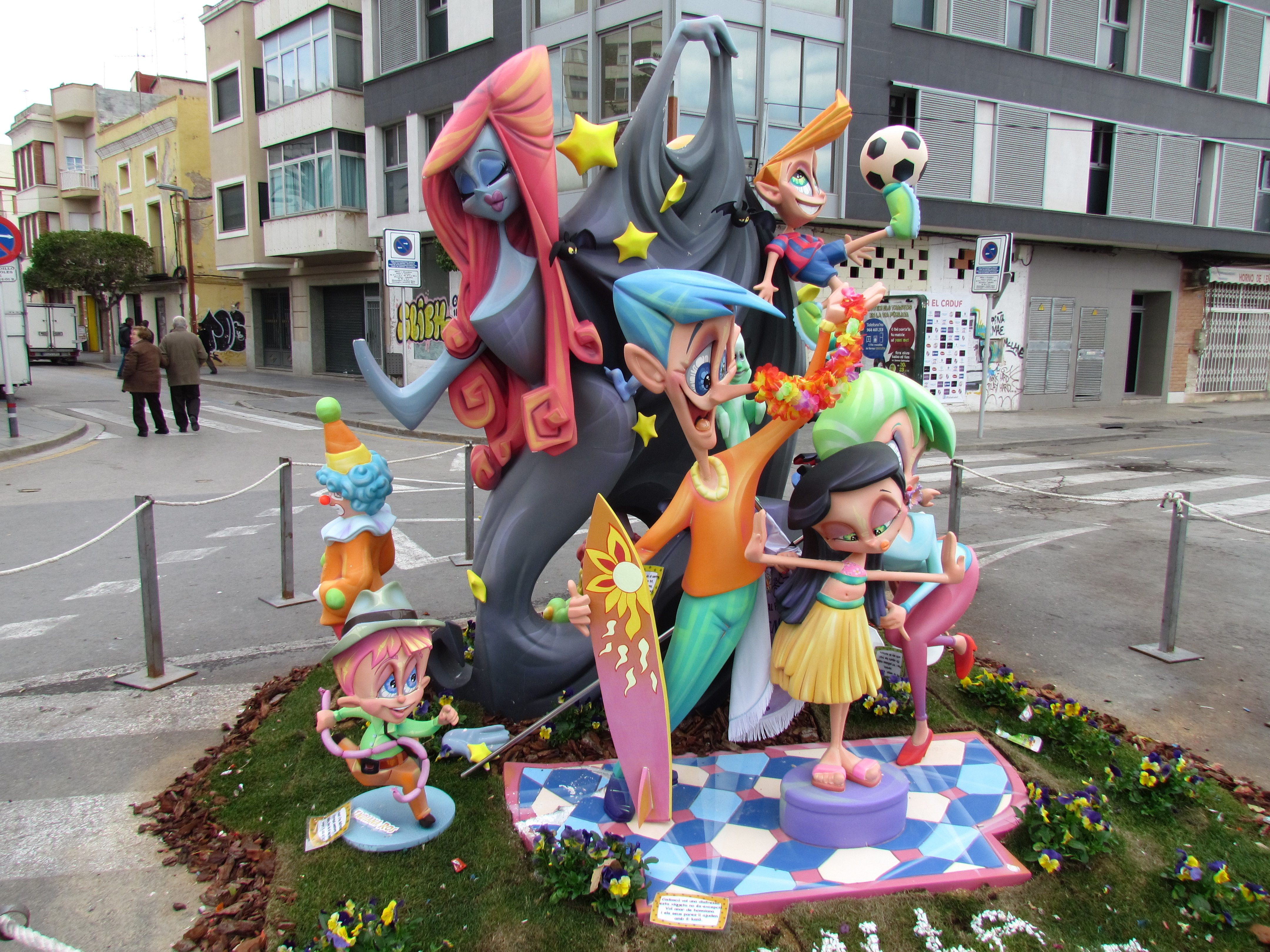 Falla el Caduf. Segon premi infantil de les Falles de Benicarló 2016